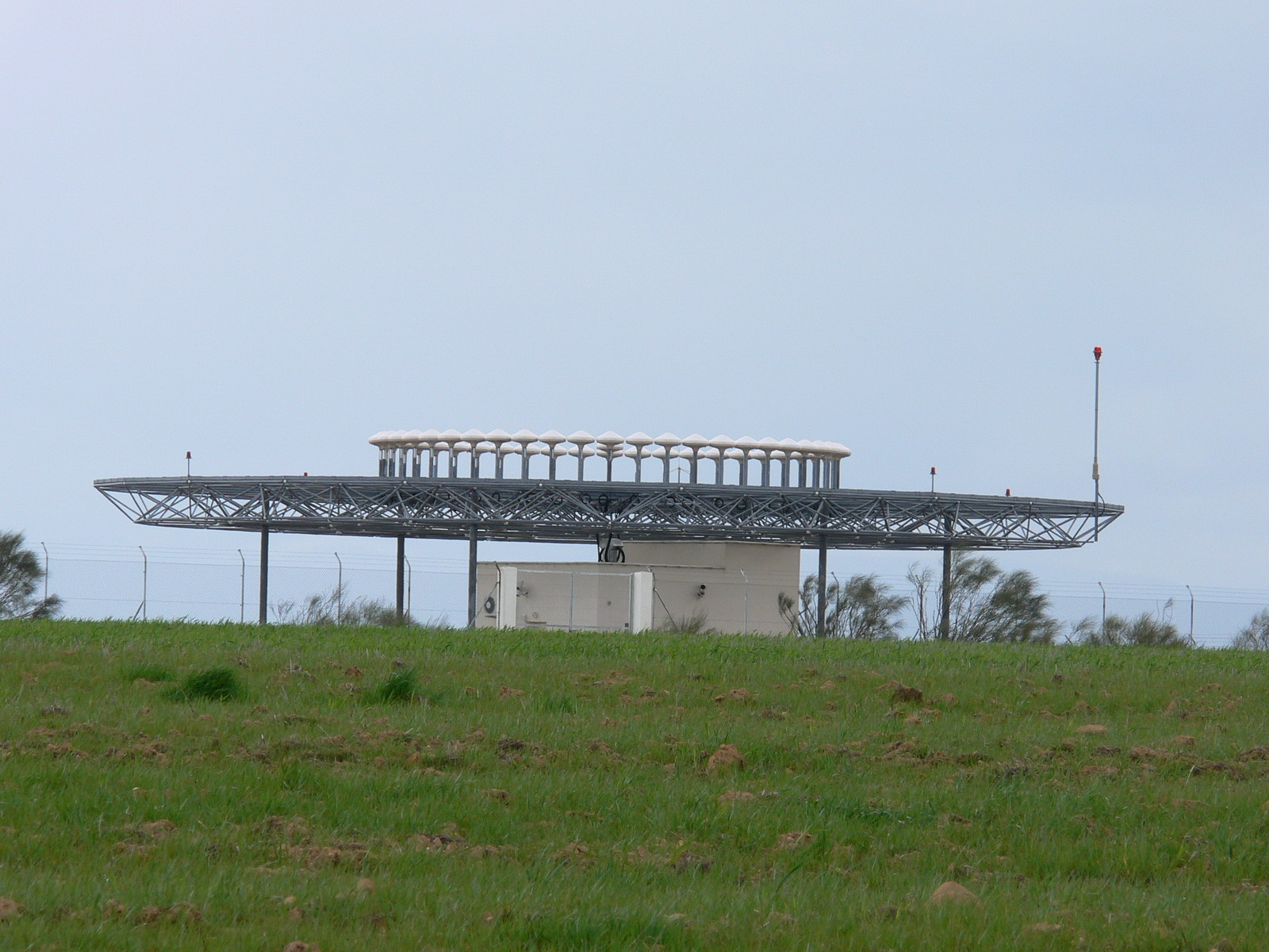 Emisor VOR